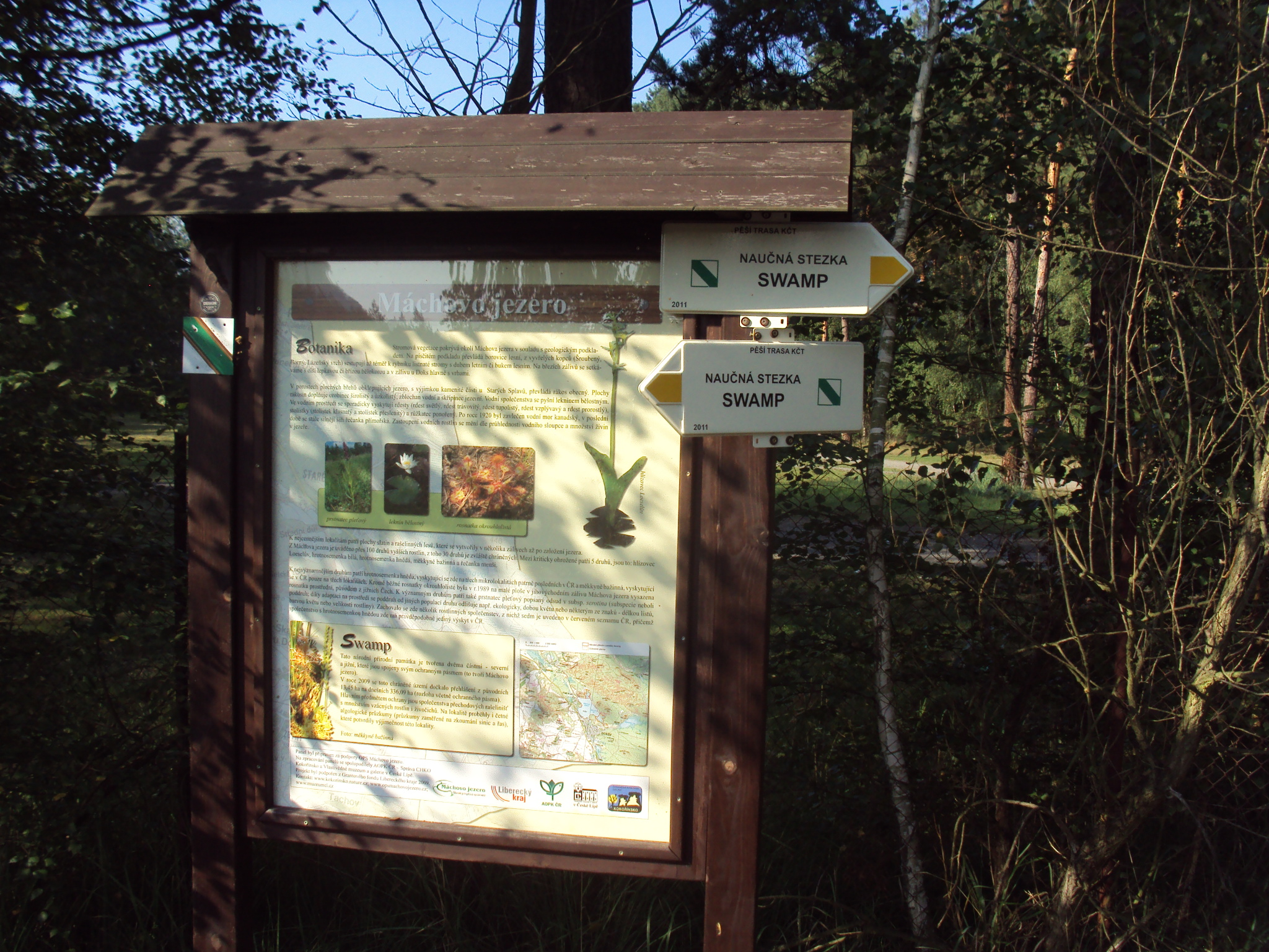 Jedna z tabulí u Máchova jezera na severní straně